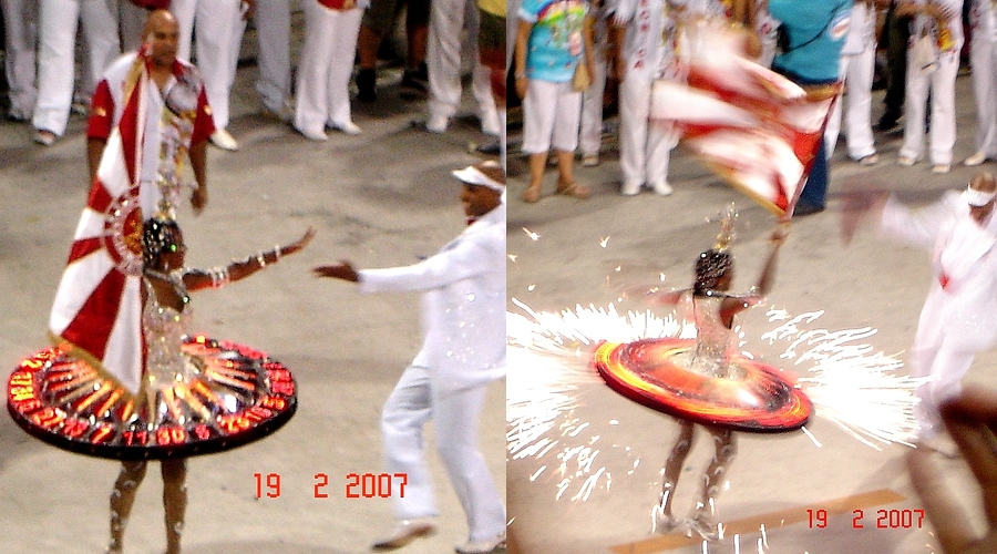 Casal de Mestre-sala e Porta-bandeira da Viradouro no carnaval 2007. Ideia do carnavalesco Paulo Barros.....